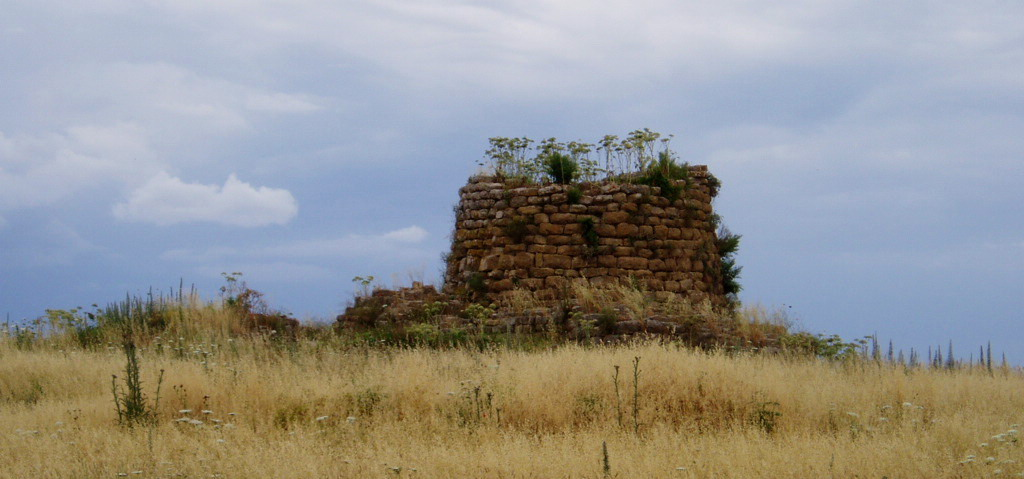 Nuraghe Piscu, Subito dopo Suelli, proseguendo per Mandas, sulla sinistra della strada.